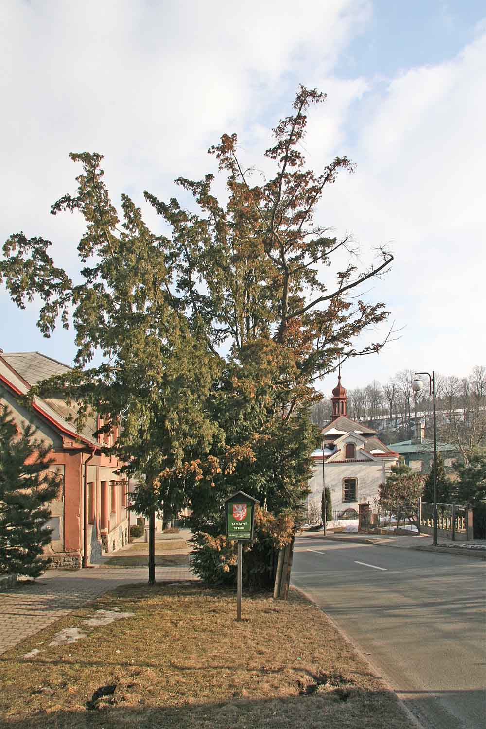 Památný tis v ulici Českých Bratří v Novém Městě nad Metují